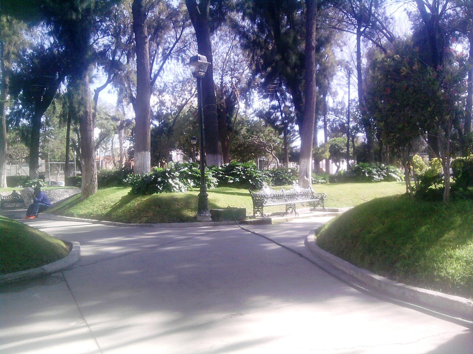 Parks in Pachuca